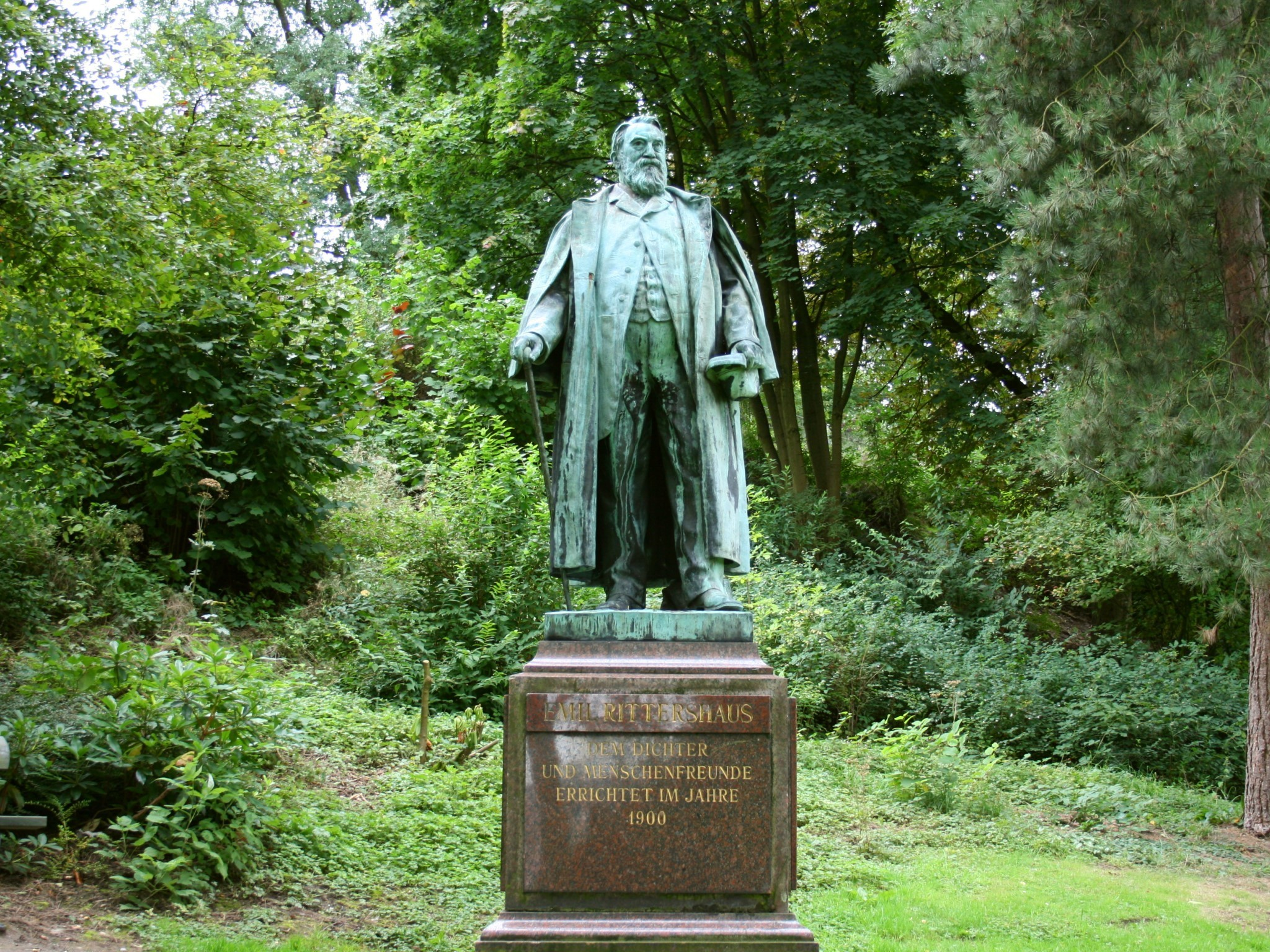 Friedrich Emil Rittershaus-Denkmal in den Barmer Anlagen in Wuppertal-Barmen